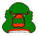 Glifo Náhuatl del municipio de Mineral del Monte,Hidalgo